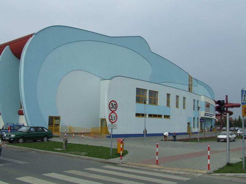 Lomianki, sport centre